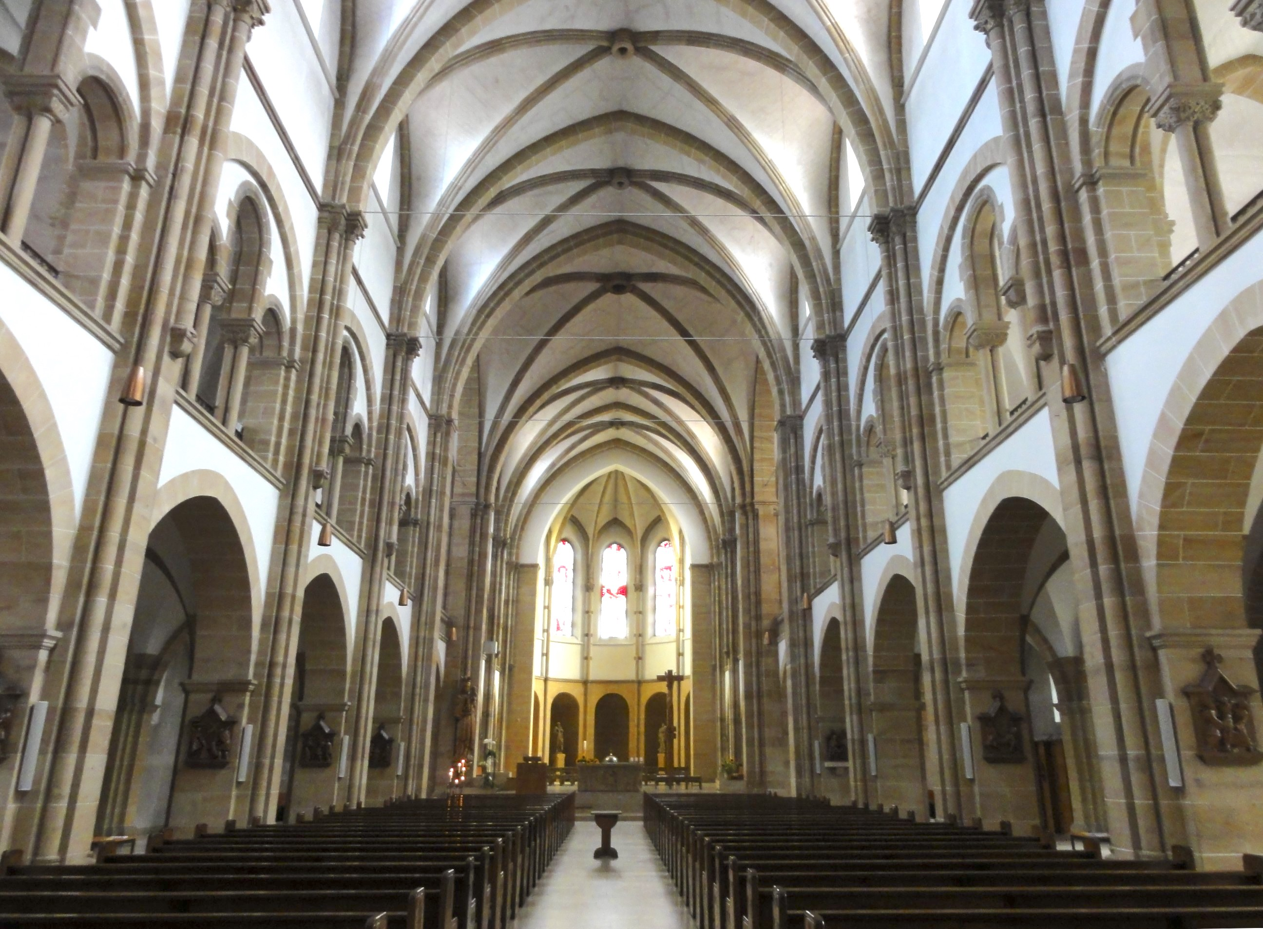 Rheinland-Pfalz, Landau in der Pfalz, Marienkirche